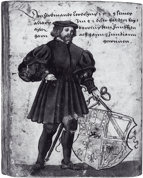 Hernán Cortés, der Eroberer des Aztekenreichs in Mexiko. Zeichnung von Christoph Weiditz (1529) Der aus Augsburg stammende Weiditz hielt sich 1529 in Spanien auf und zeichnete dort Cortés wie auch eine Truppe aztekischer Schaukünstler und Akrobaten, die Cortés aus der Neuen Welt mitgebracht hatte. Die obige Darstellung ist die einzige authentische, die überliefert wurde. Die Inschrift über der Zeichnung besagt: "Don Ferdinando Cordesyus 1529 seines altars Im 42 [Jahr] dieser hat der Kayserlichen Majestät Karolus dem Funfften darnach ganntz Inndiann gewunnen".